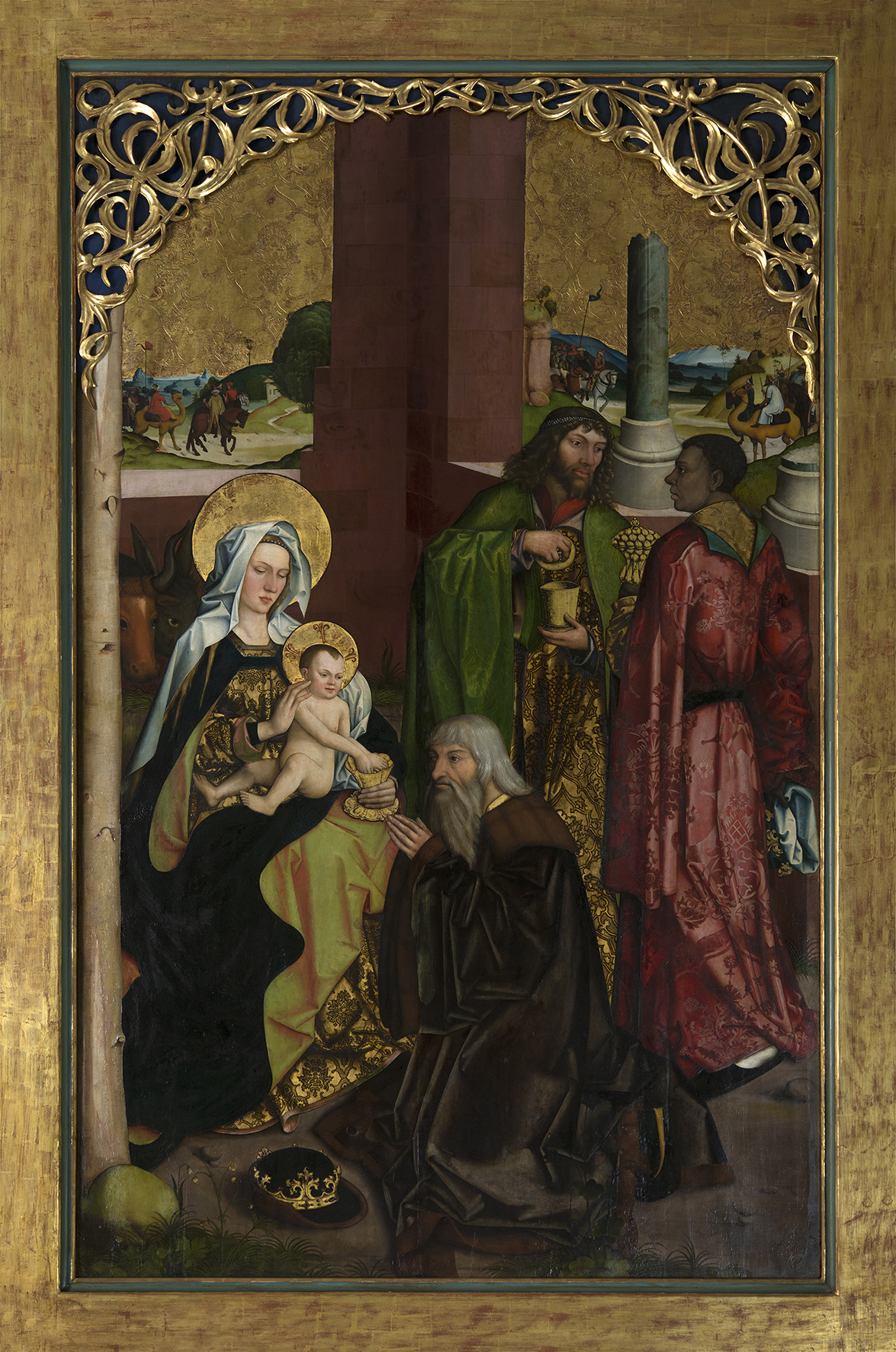 Anbetung der Weisen von Bartholomäus Zeitblom